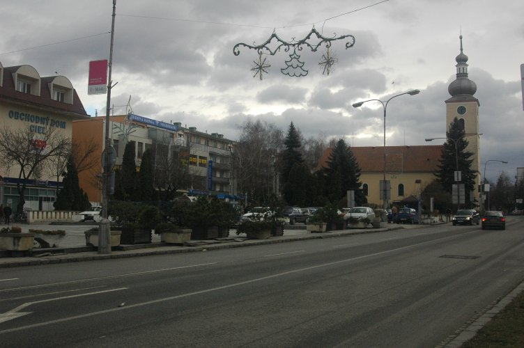 Liberation Square, Senica, Slovakia